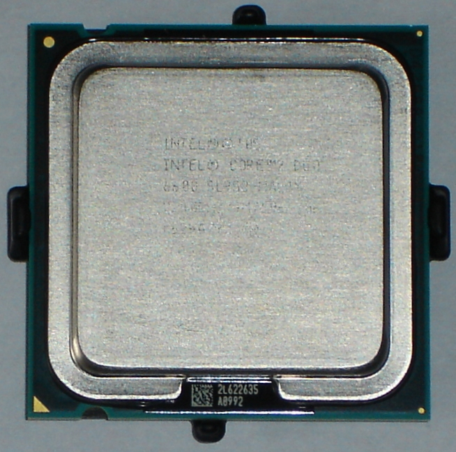 Intel Core 2 Duo E6600 "Conroe" microprocessor